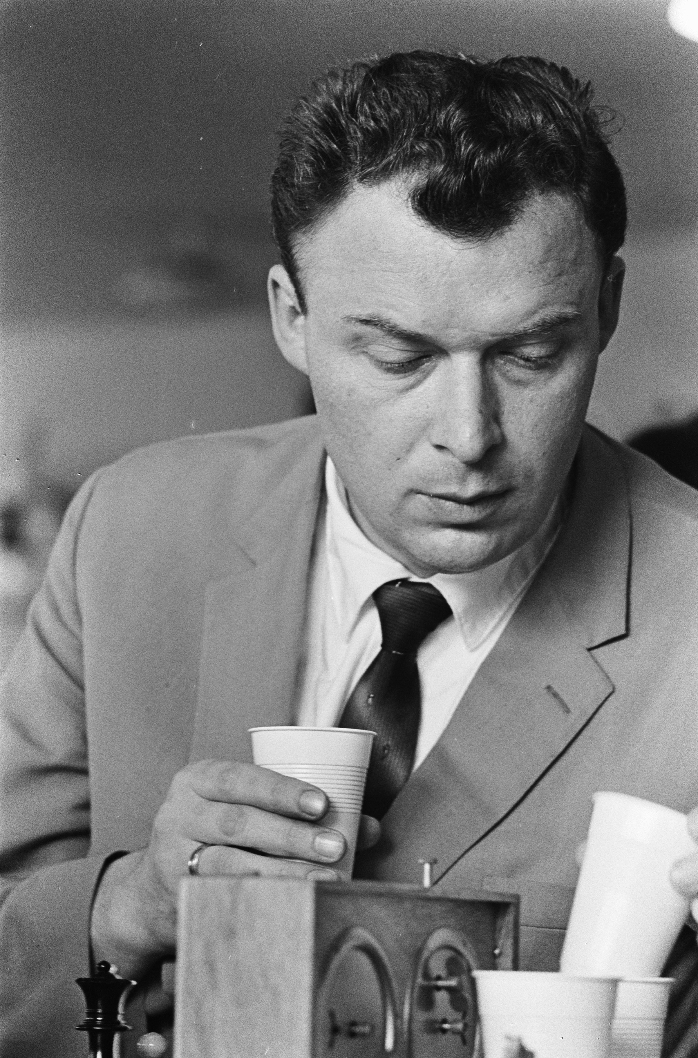 Collectie / Archief : Fotocollectie Anefo Reportage / Serie : [ onbekend ] Beschrijving : IBM schaaktoernooi, M. Filip (Tsjechoslowakije) Datum : 25 juli 1965 Locatie : Tsjecho-Slowakije Trefwoorden : schaken, tournooien Persoonsnaam : M. Filip Instellingsnaam : IBM Fotograaf : Kroon, Ron / Anefo Auteursrechthebbende : Nationaal Archief Materiaalsoort : Negatief (zwart/wit) Nummer archiefinventaris : bekijk toegang 2.24.01.05 Bestanddeelnummer : 917-9984